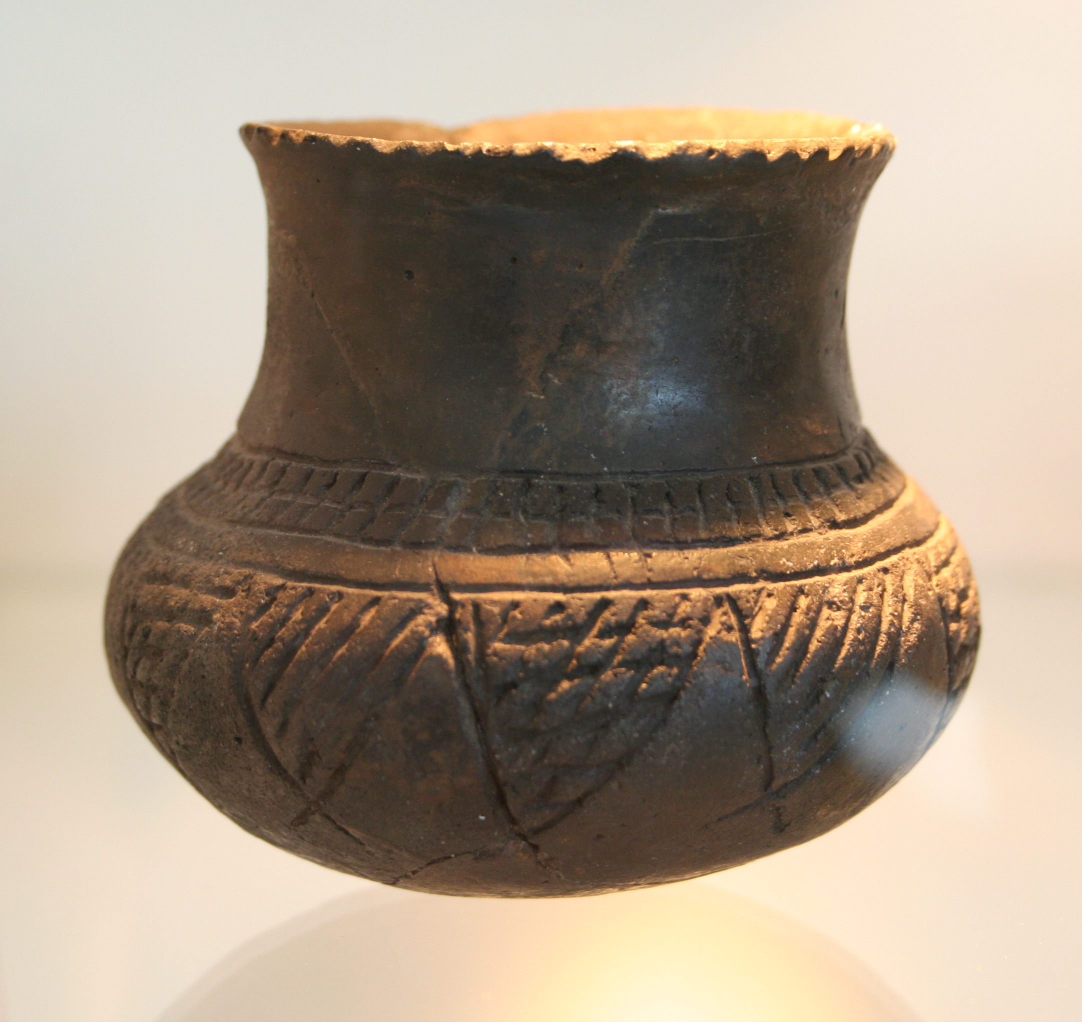 Kugelbecher der Rössener Kultur aus Hüde; Landesmuseum für Natur und Mensch, Oldenburg